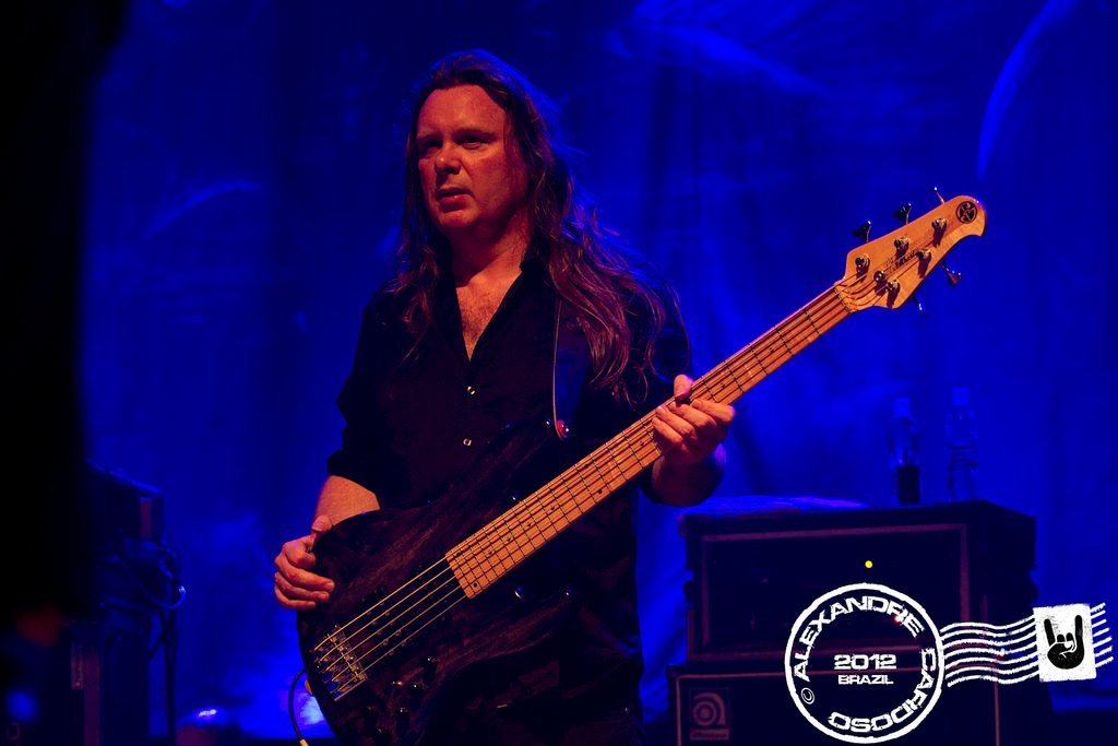 A banda Blind Guardian ao vivo no Credicard Hall - 23/04/2012 - São Paulo, Brasil